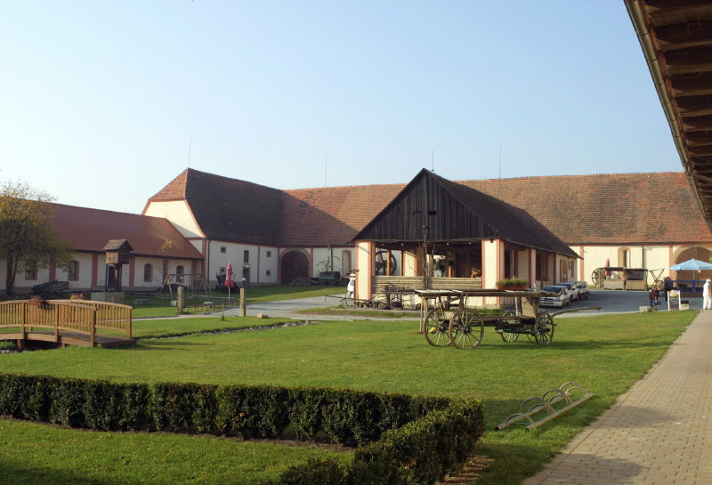 Nádvoří hospodářského dvora Býkov. Datum: 30. listopadu 2005